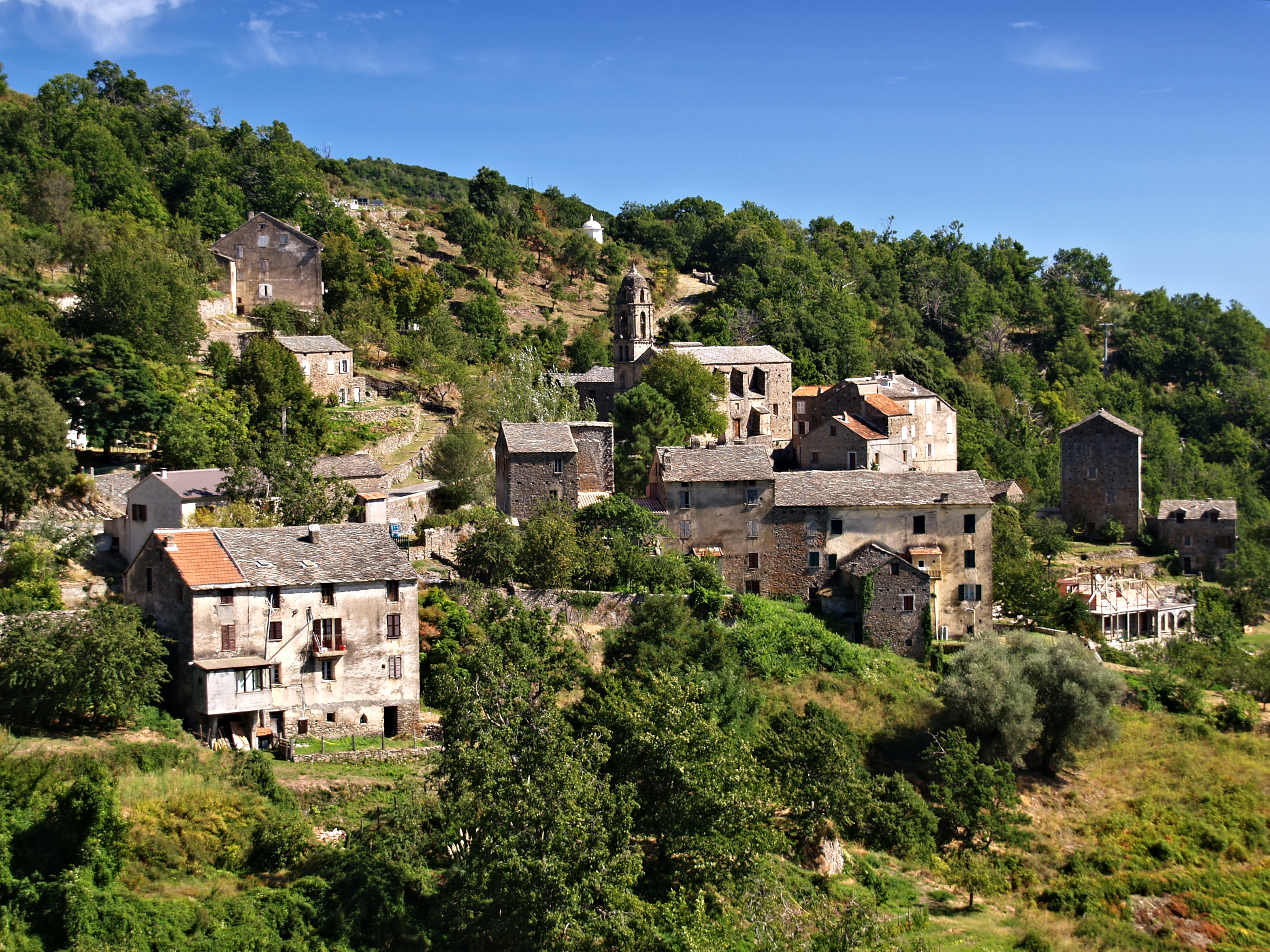 Zuani (Corsica) - Vue du village